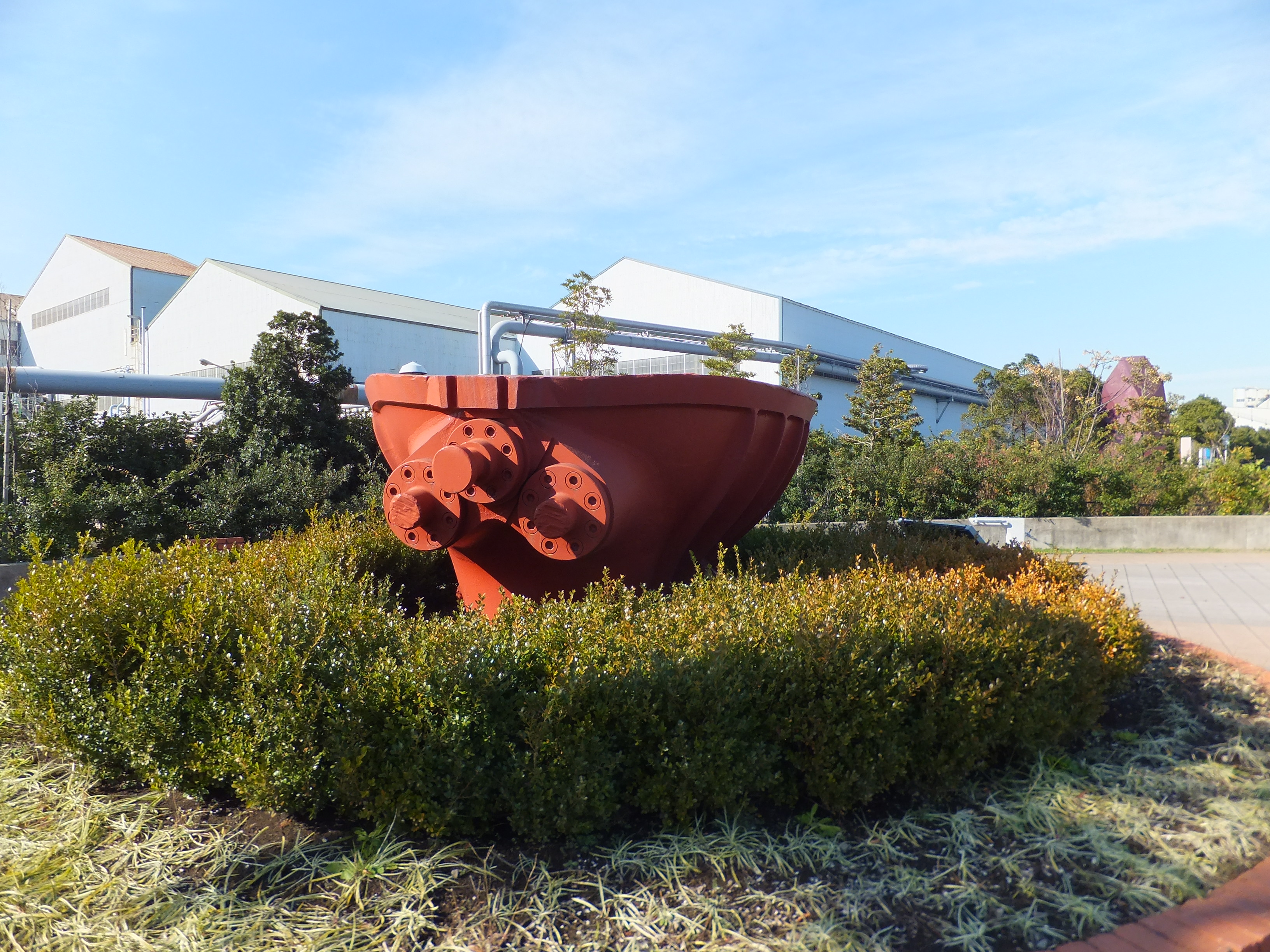 ハーバーシティ蘇我の一角にある川崎鉄なべ広場公園（千葉市中央区）。ハーバーシティ蘇我はJFEスチール東日本製鉄所（川崎製鉄千葉東工場）の敷地の一部を転用して整備された再開発地区で、かつて製鉄所で使われたスラグ鍋を設置した公園が整備された。